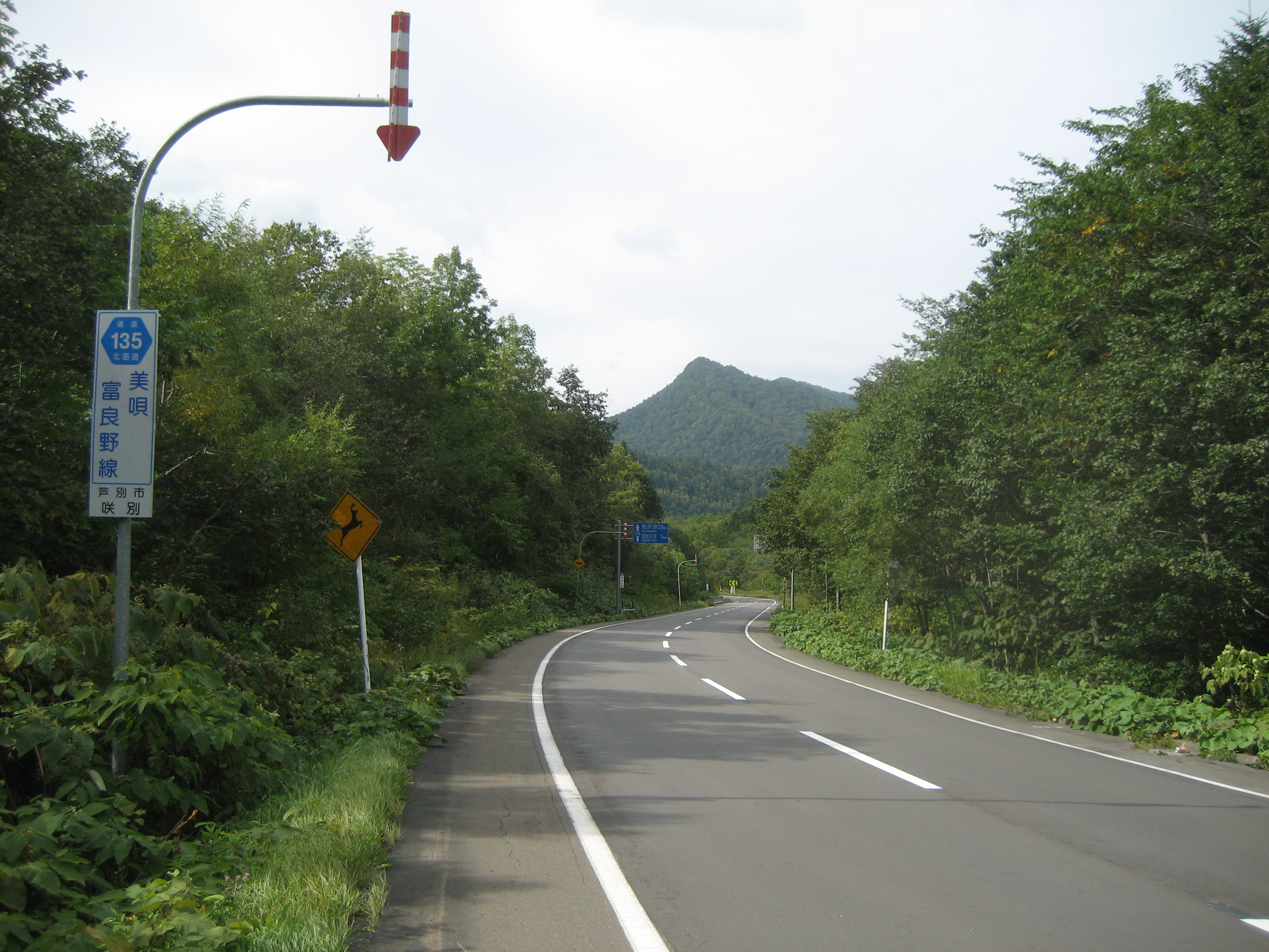 芦別市咲別付近（桂沢湖方面を撮影）